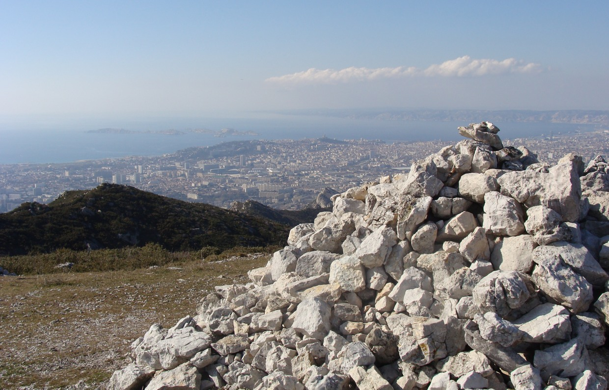 Sommet du mont Saint-Cyr. Vue sur la ville et la rade de Marseille.